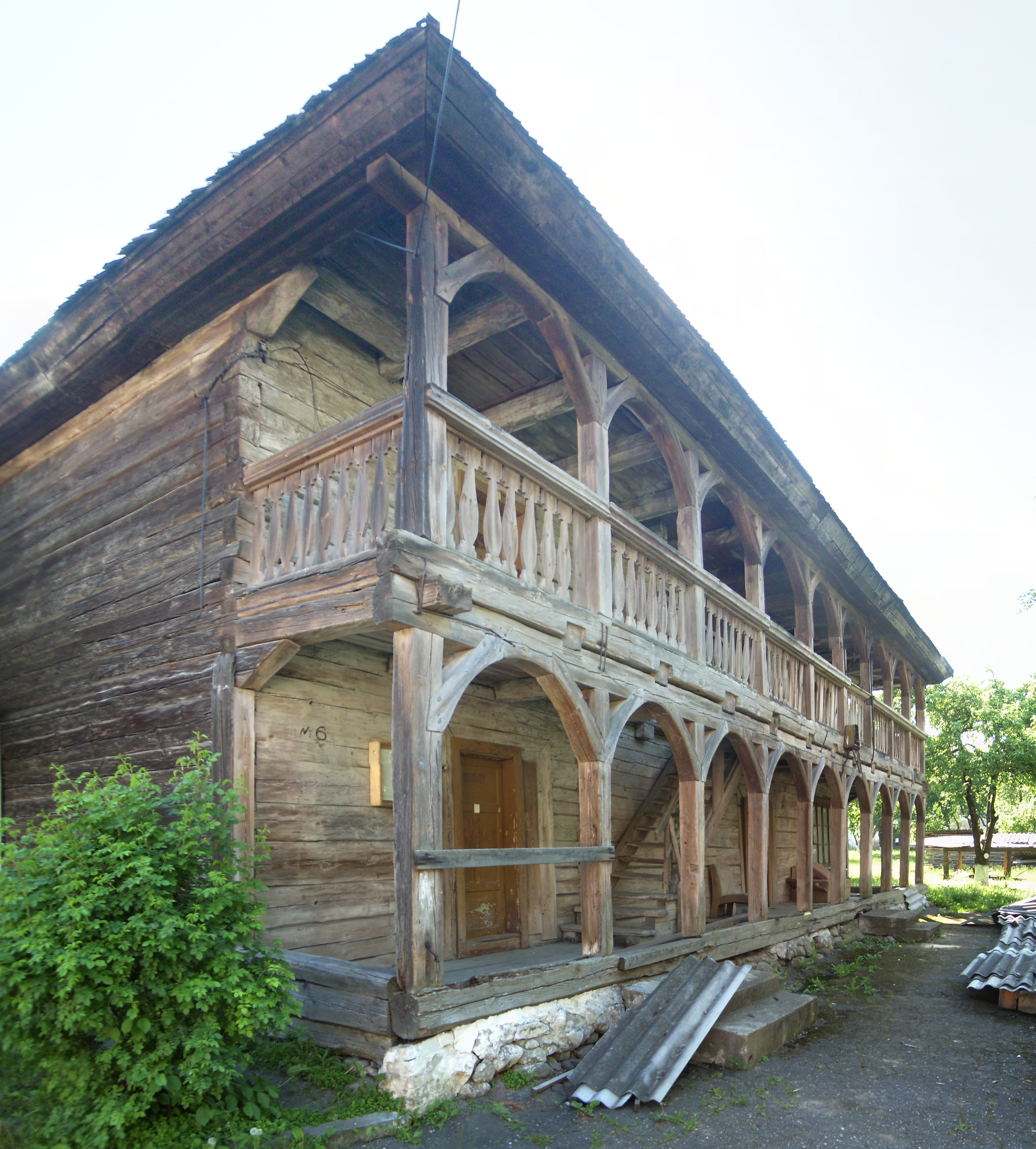 Беларуская (тарашкевіца): Ансамбль былога кляштара брыгітак:касьцёлжылы корпуслямусагароджа з брамай. г. Горадня This is a photo of Belarusian heritage monument. Reference number: 412Г000017 ( WLM)